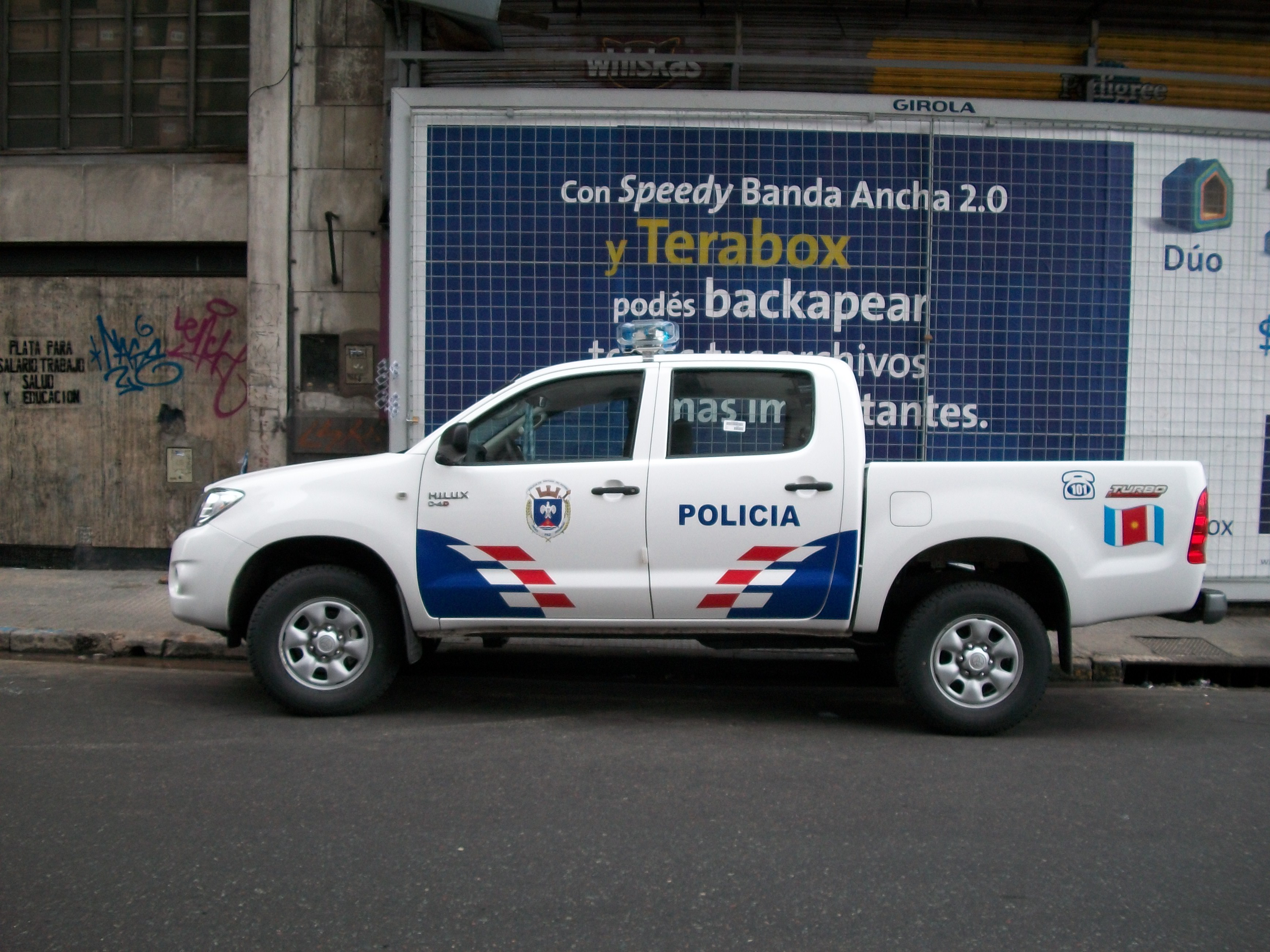 Celebracion del Bicentenario de Argentina